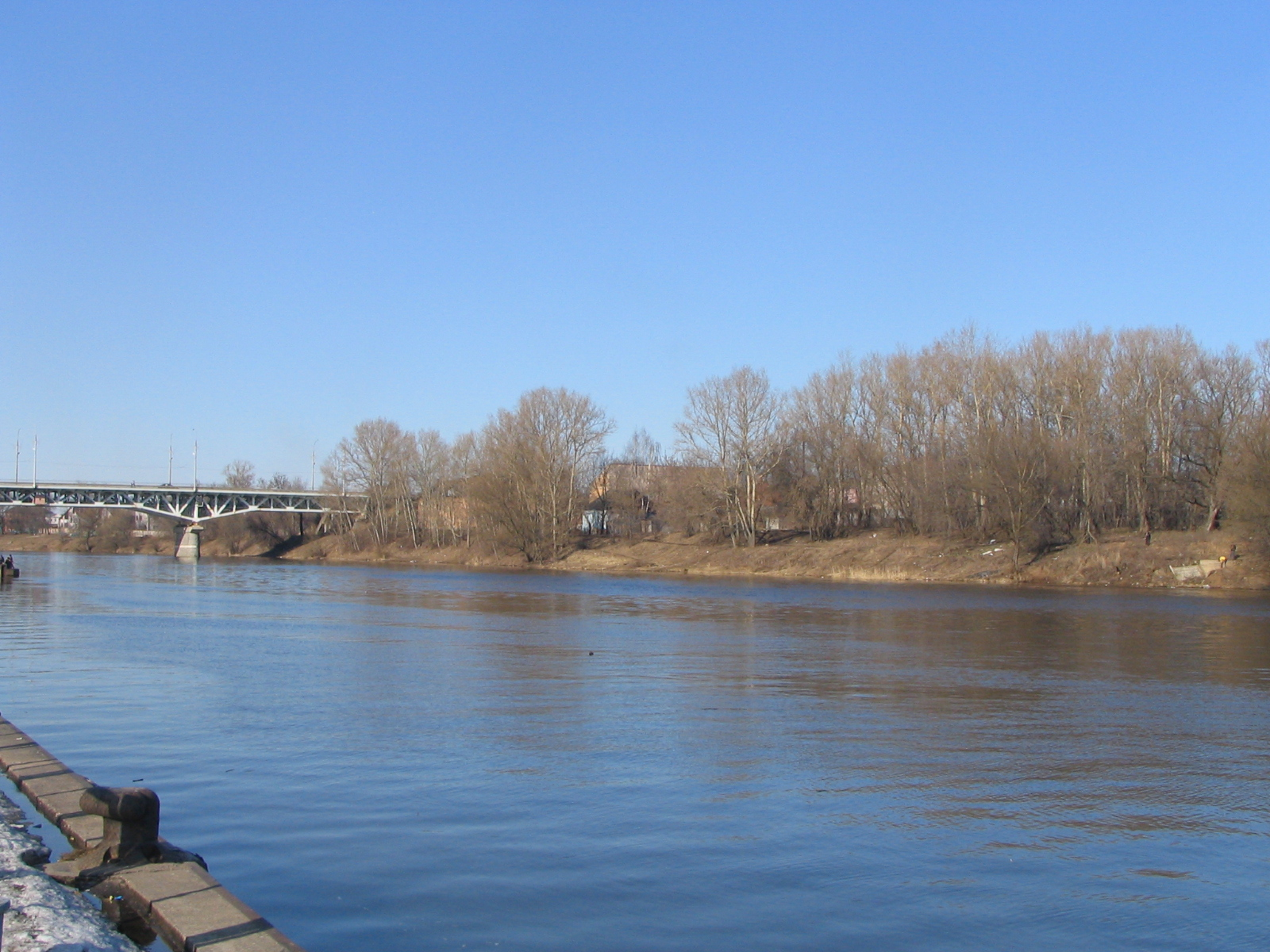 Tvertsa River in Tver, Russia